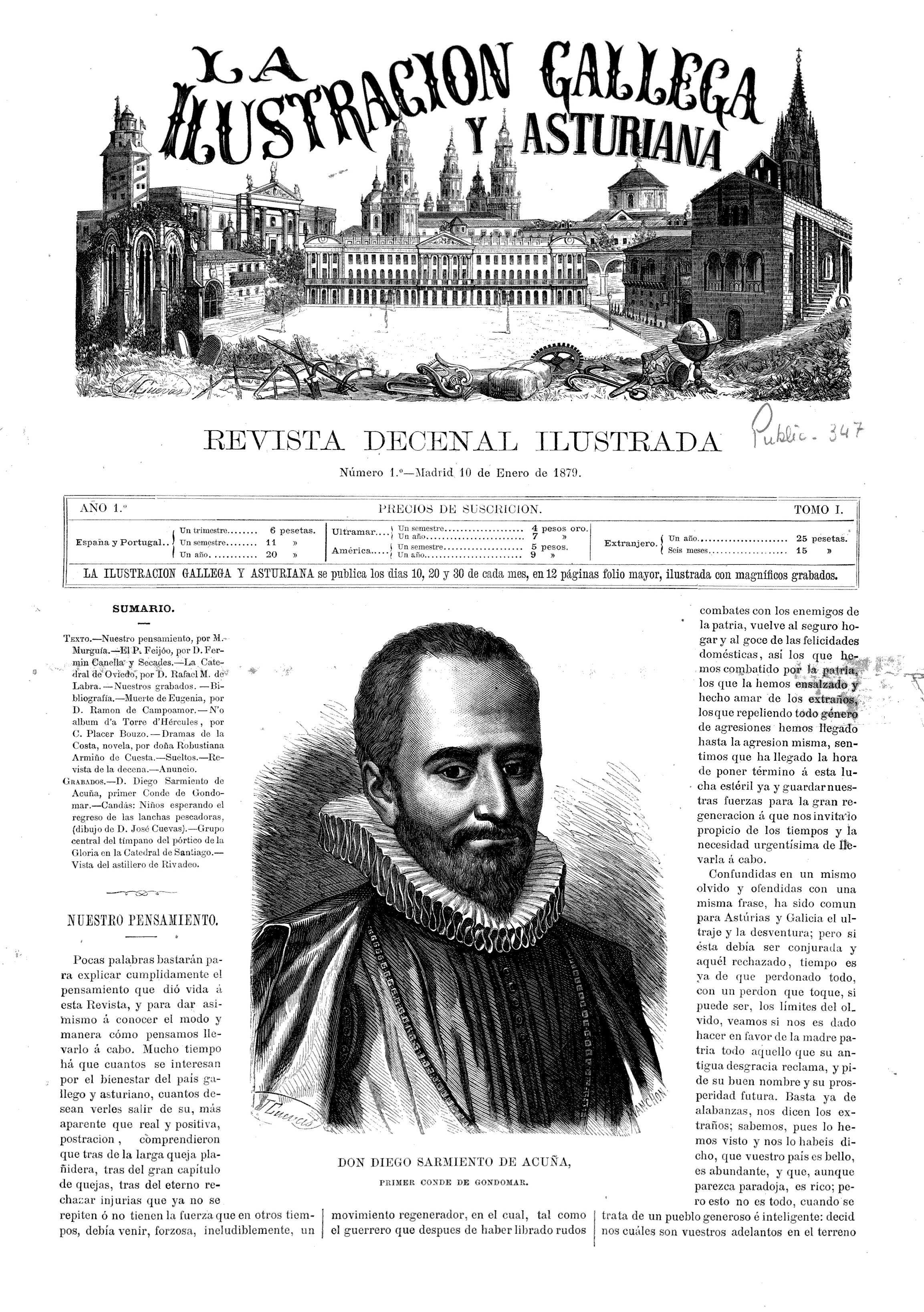 Portada do número 1 da revista «La Ilustración Gallega y Asturiana».